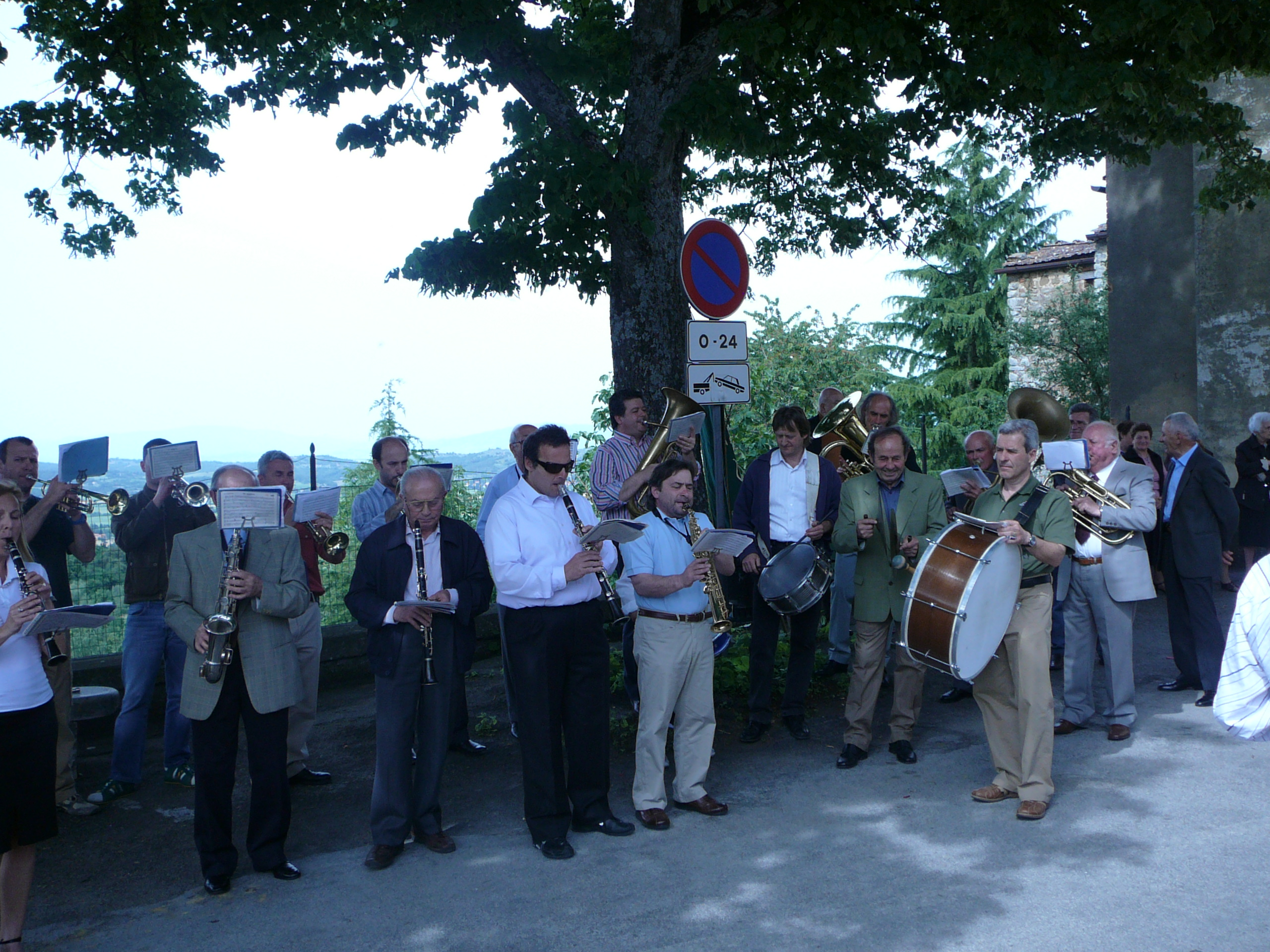 Società Filarmonica Pietro Mascagni di Farnetella (Siena)